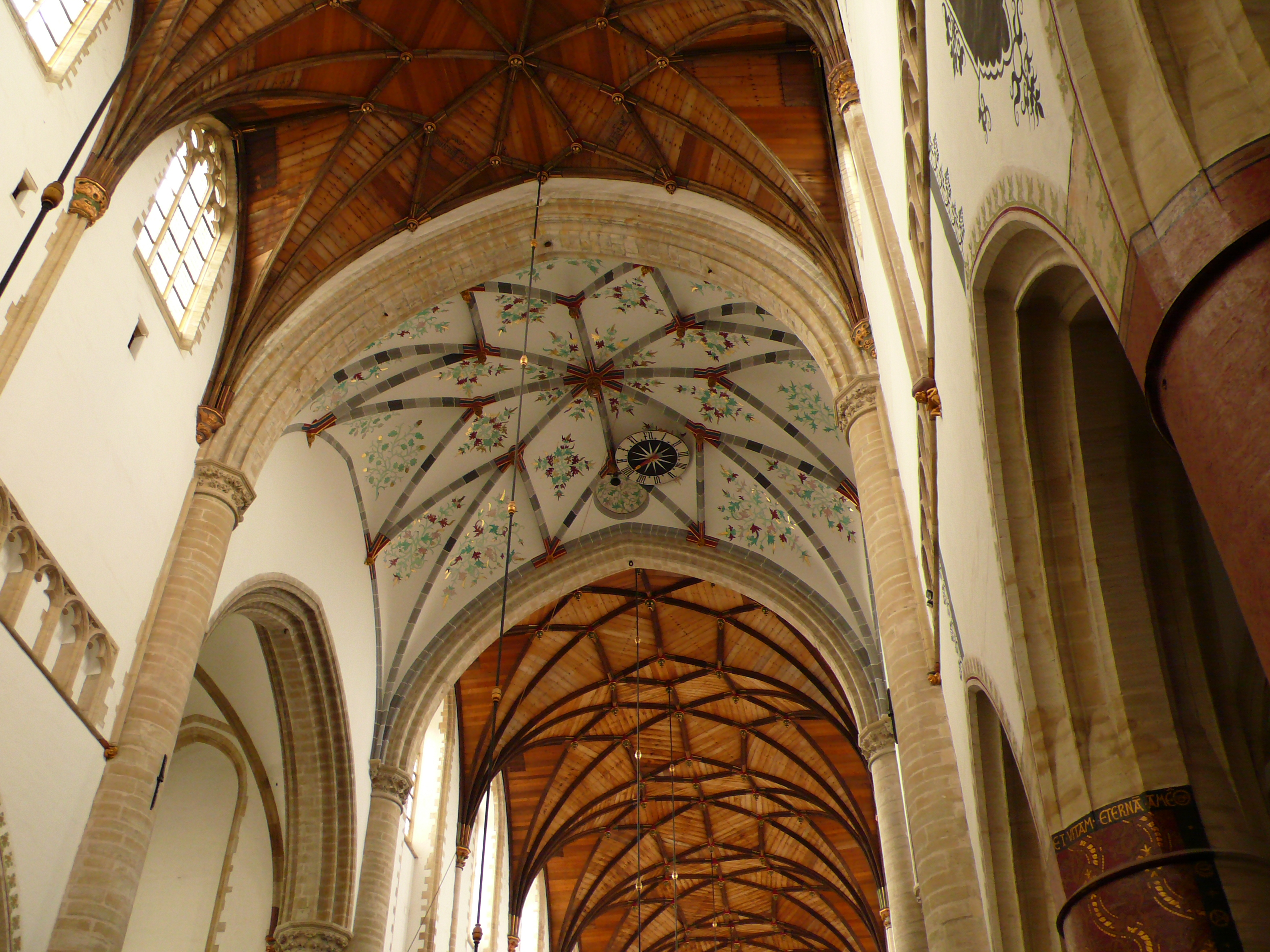 Grote Kerk in Haarlem, Niederlande; Vierung